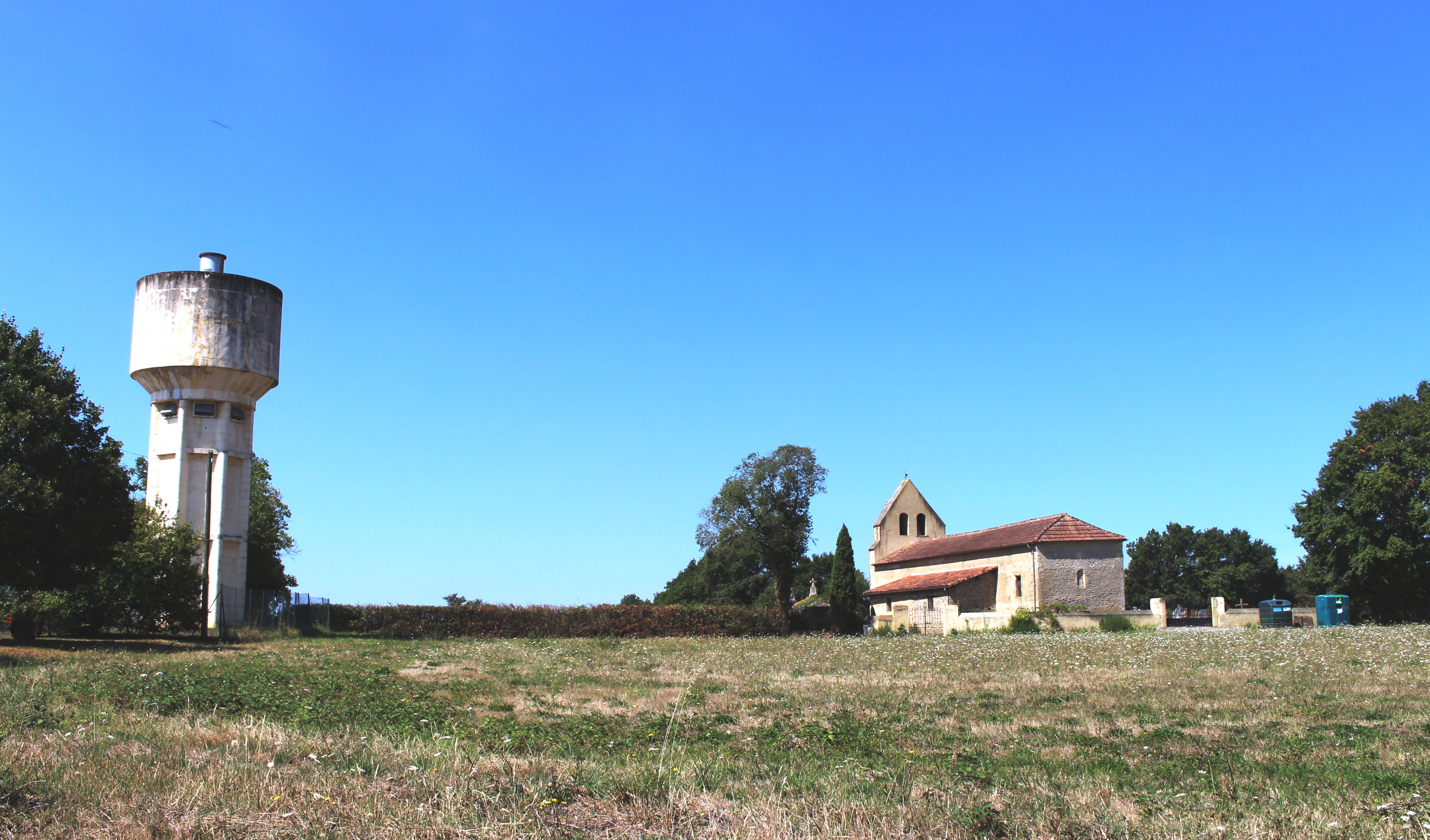 Hagedet (Hautes-Pyrénées)